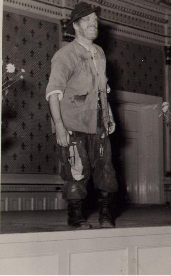 Heimo Lepistö esittämässä Ryysyrannan Jooseppia vuosien 1956-1958 välillä Vaasan kaupungintalolla.